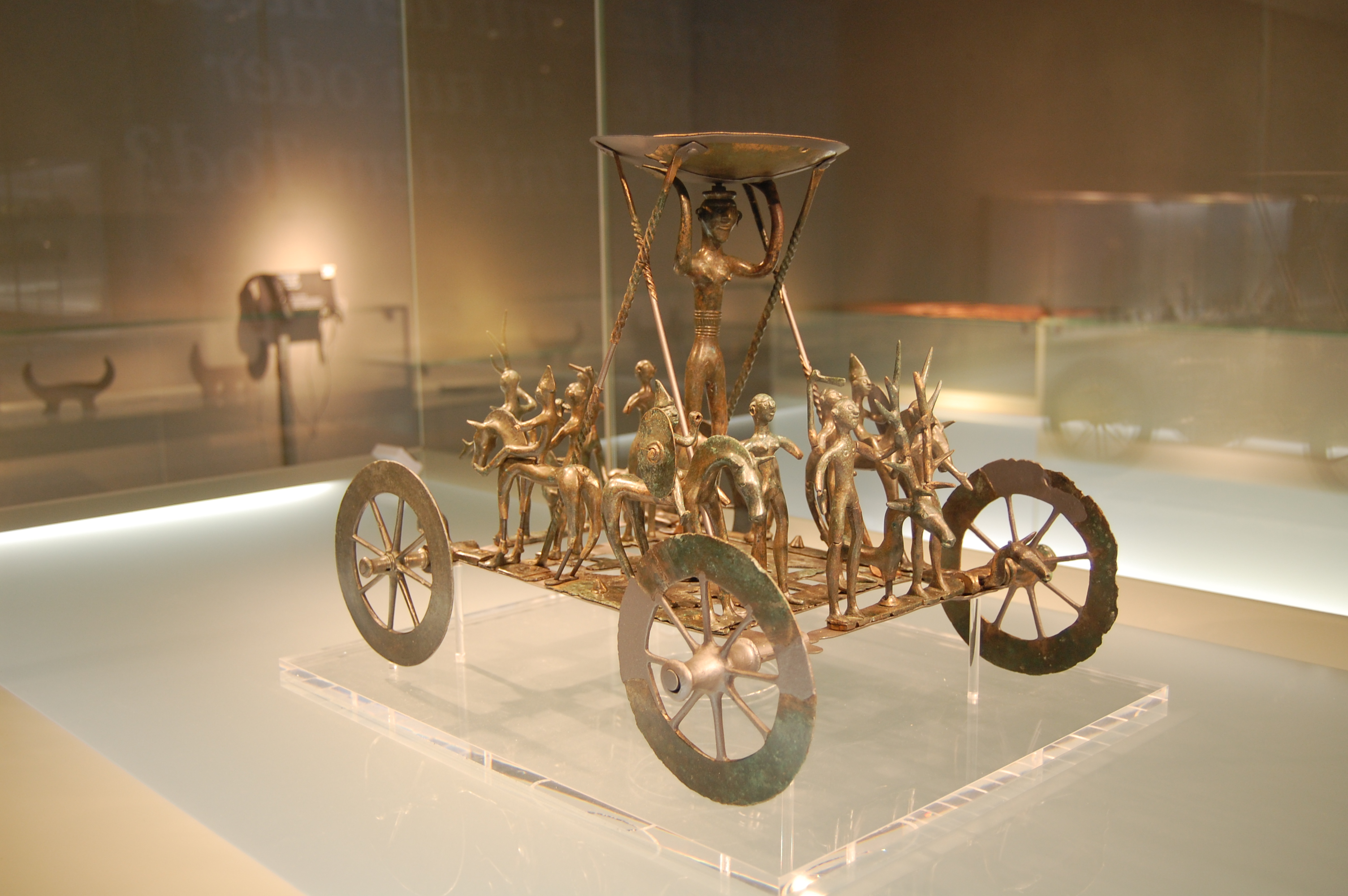 Kultwagen von Strettweg im Archäologiemuseum des Universalmuseum Joanneum